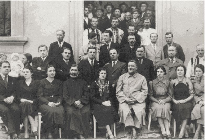 Comitetul pentru constructia dispensarului uman din Dolhestii Mari. Printre prezenti: Cocuta Manoliu (casatorita Manuca), Elisabeta Forascu, preot Gheorghe Manoliu, Mihai Radulescu, Clara Postelnicu, Minodora Marian, Petru Sandovici, Emil Gheorghiu, Olimpia Gheorghiu, Vasile Dimitriu, Petru Postelnicu, Dumitru T. Marian, Dumitru Sandovici, Dumitru Marian, Neculai Tipau, Petrea Niculaiasa, Toader ProcovanuNicolae Murarasu